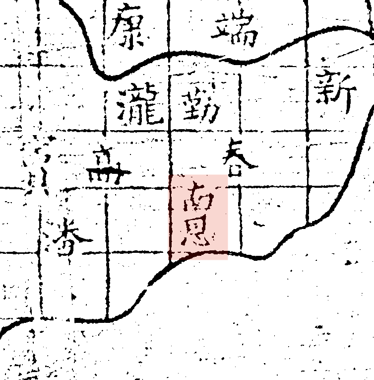 粵語: 禹跡圖中嘅南恩州